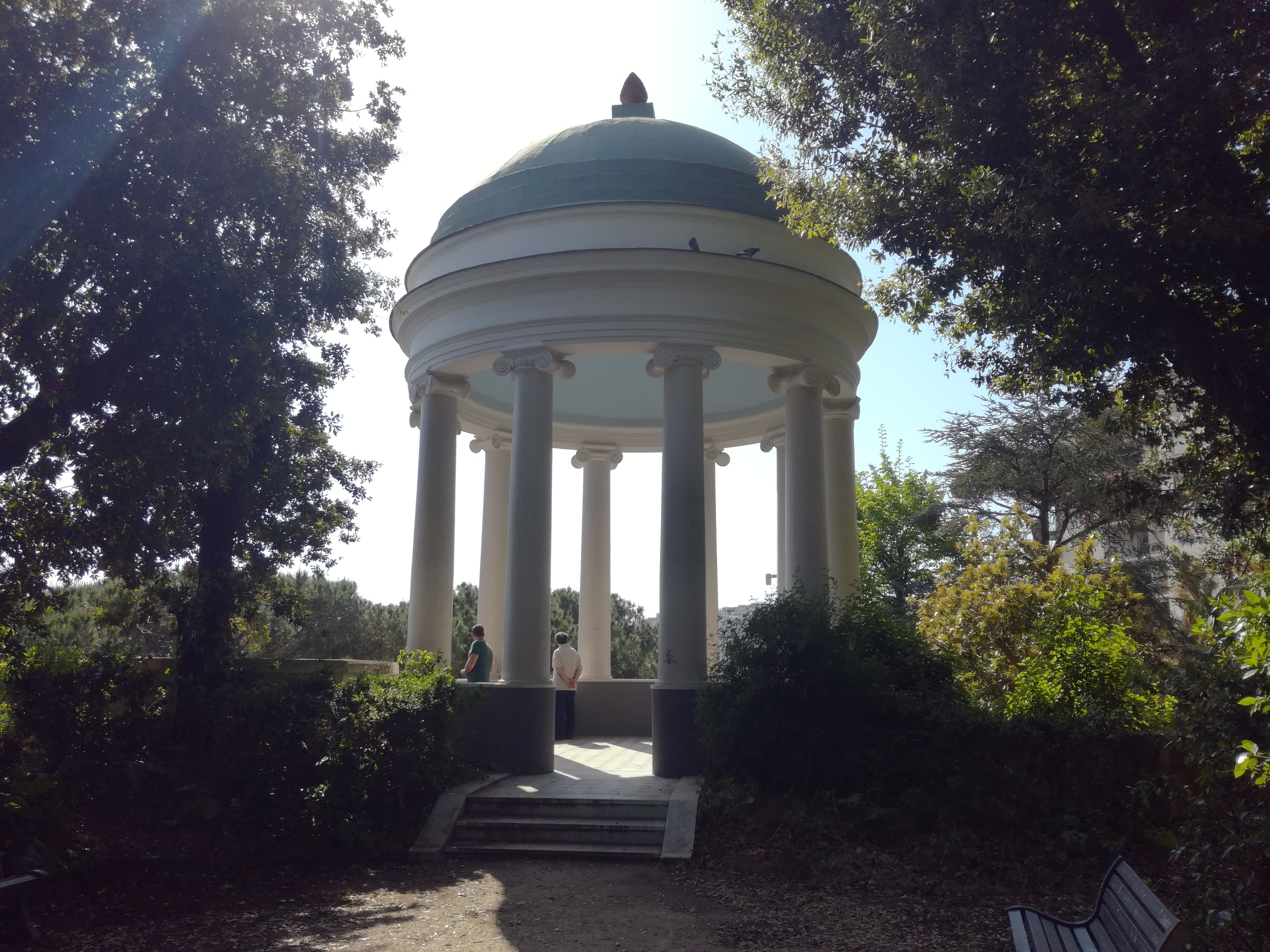 Villa Floridiana (tempietto ionico)